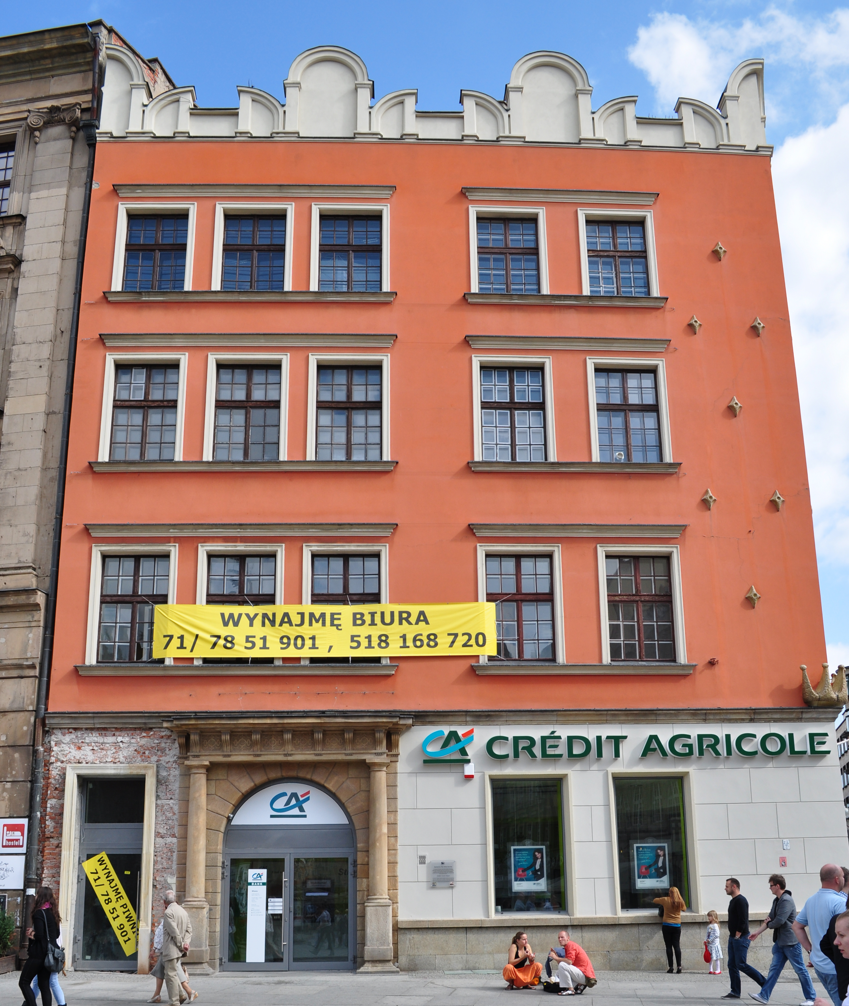 Dom handlowy d. kamienica „Pod Złotą Koroną” Oławska 2/Rynek 29, Miasto Wrocław - Stare Miasto